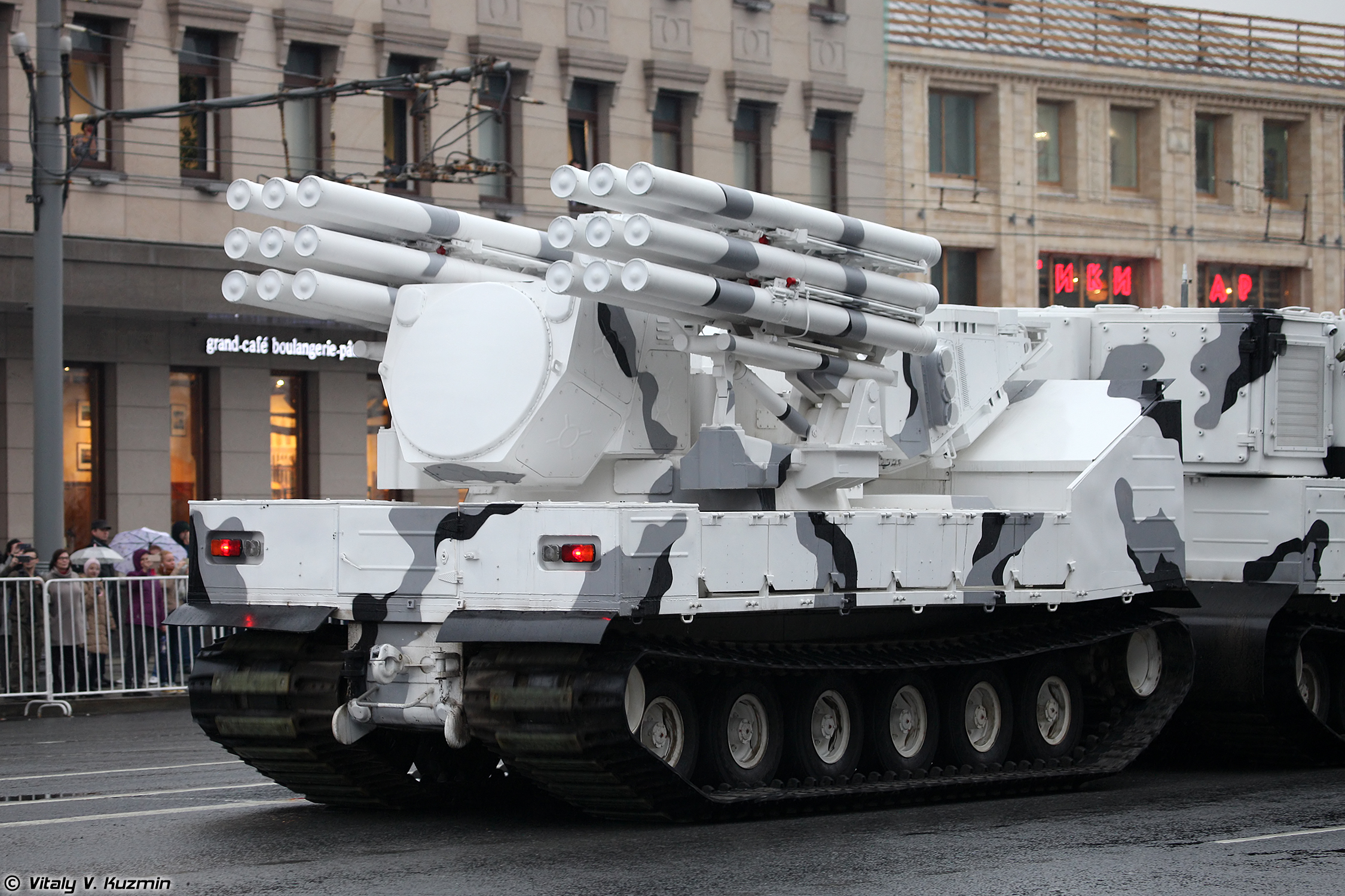 ЗРК Панцирь-СА на базе двухзвенного гусеничного транспортера ДТ-30ПМ (Pantsir-SA air defence system on DT-30PM transporter chassis)